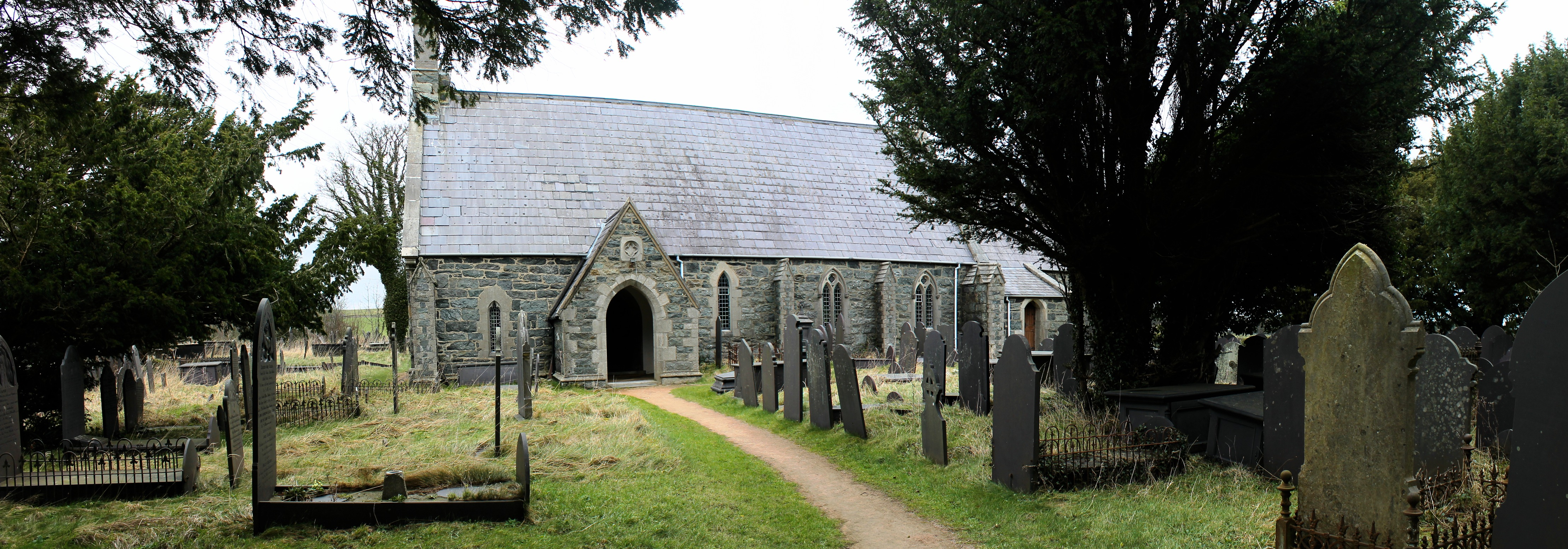 Eglwys Sant Cedol, Pentir, Gwynedd. Cofrestrwyd gan Cadw fel Gradd II.